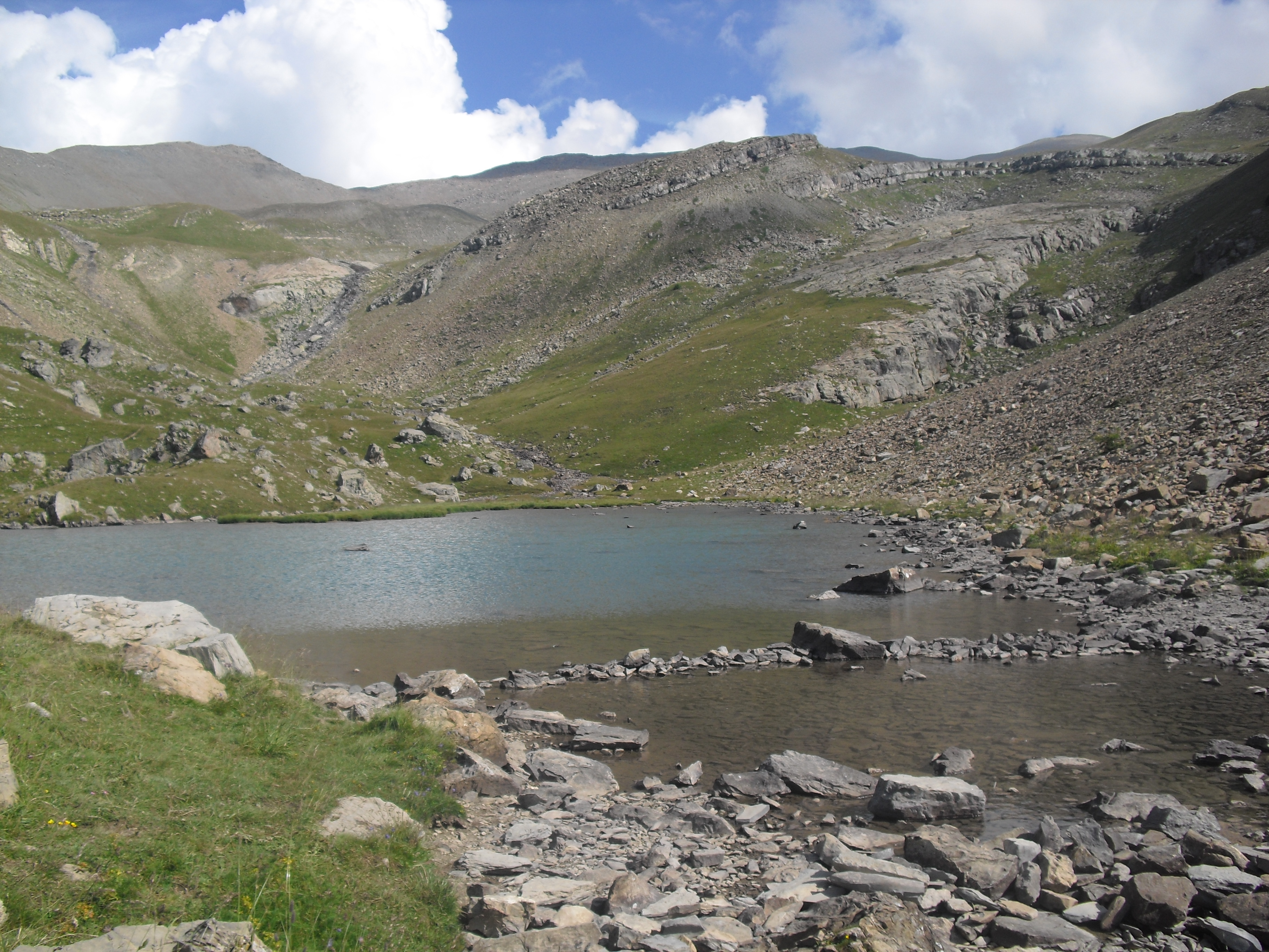 Lac du Crachet en été